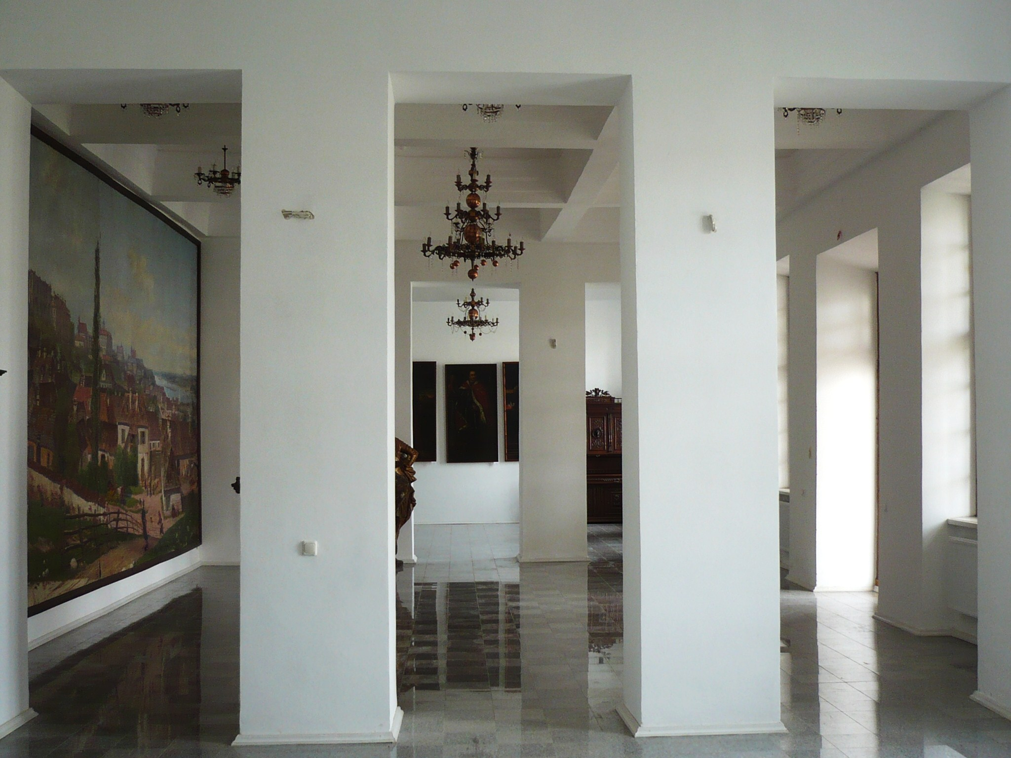 Wiśniowiec, parter pałacu